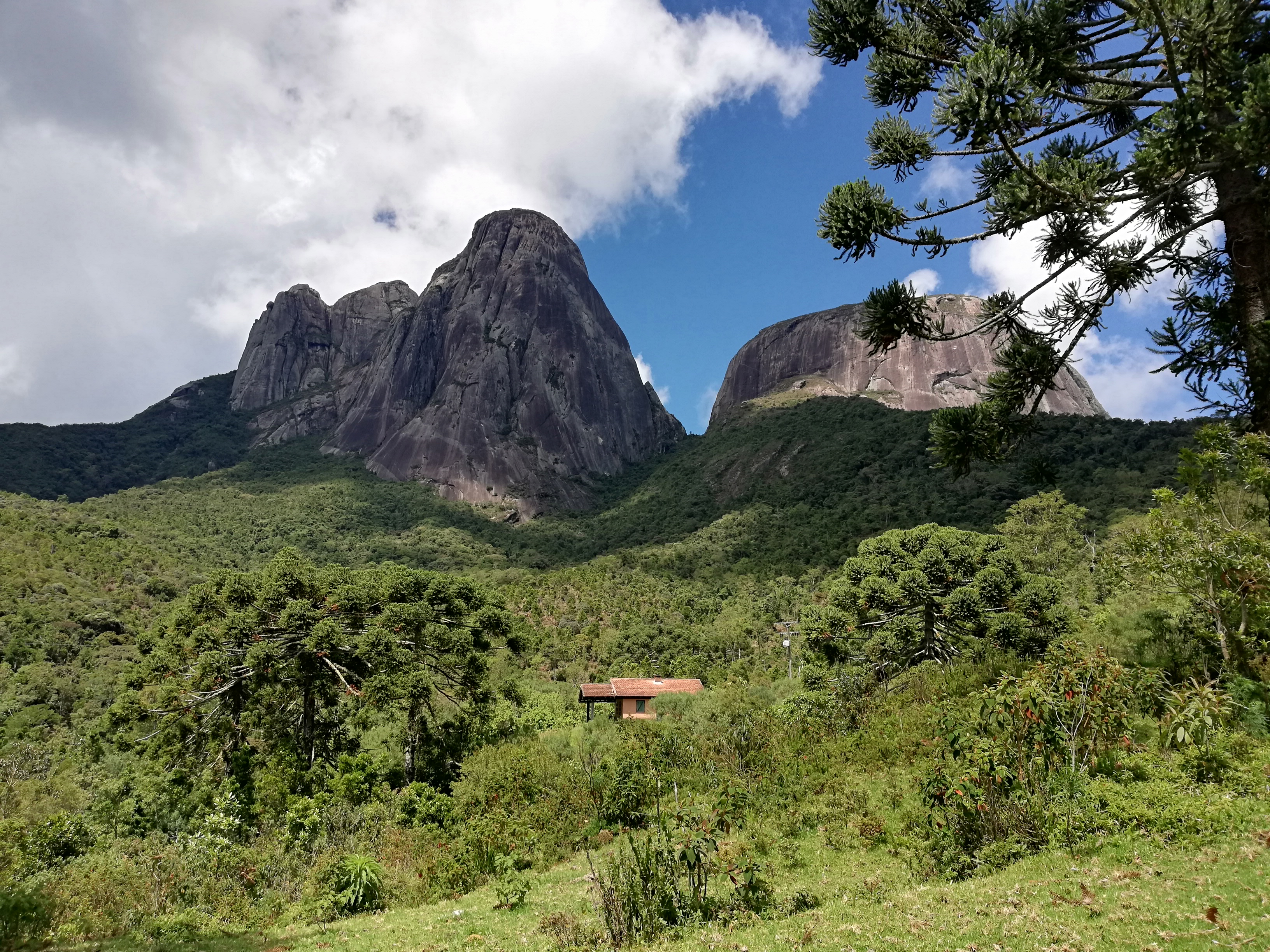 Granitfelsen der Três Picos. Im Vordergrund sieht man brasilianische Araukarien.